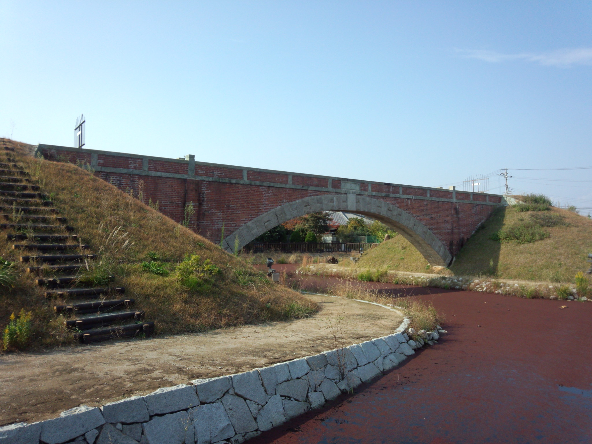 平木橋（加古川市）